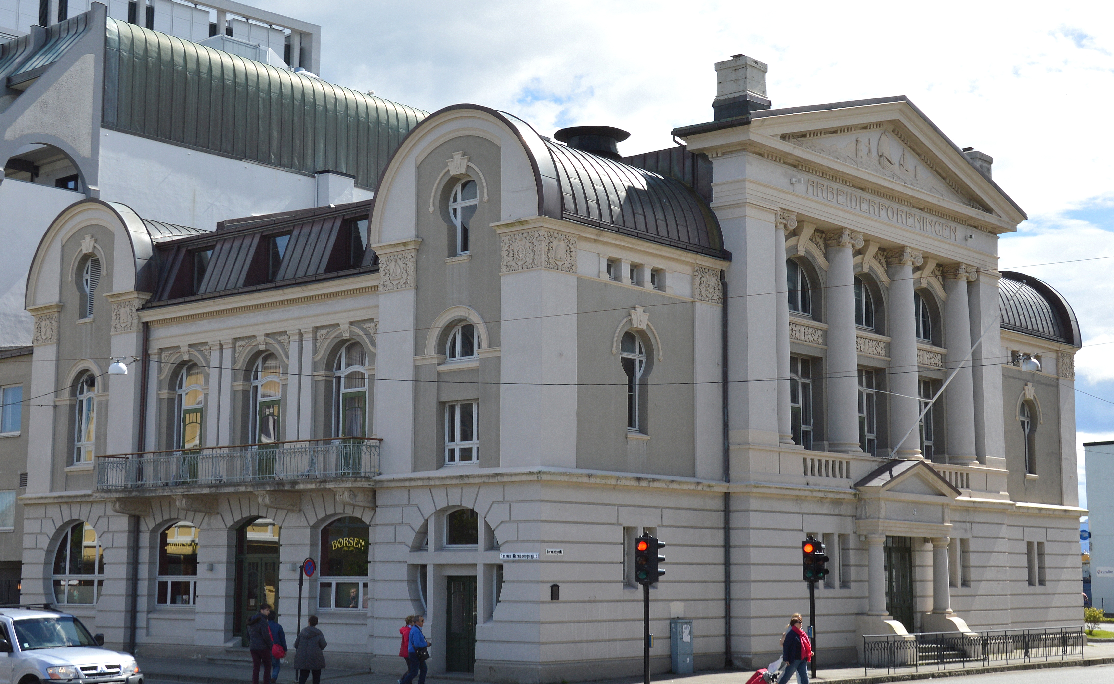 Arbeiderforeningen in Alesund